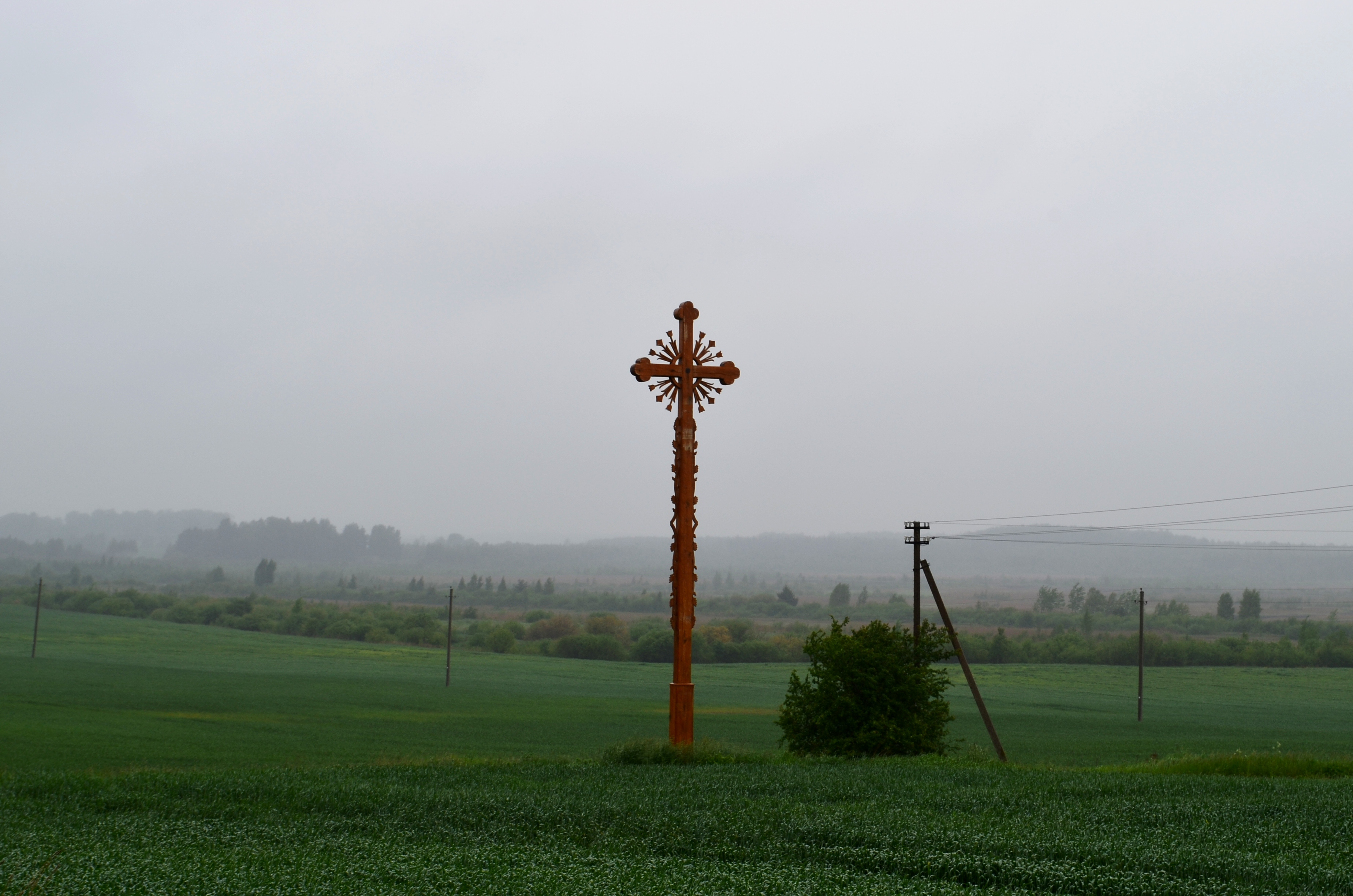 Kryžius Plekaičiuose, Kelmės r.